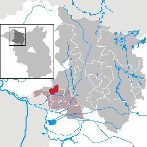 Stüdenitz-Schönermark in Brandenburg (Country) - District Ostprignitz-Ruppin